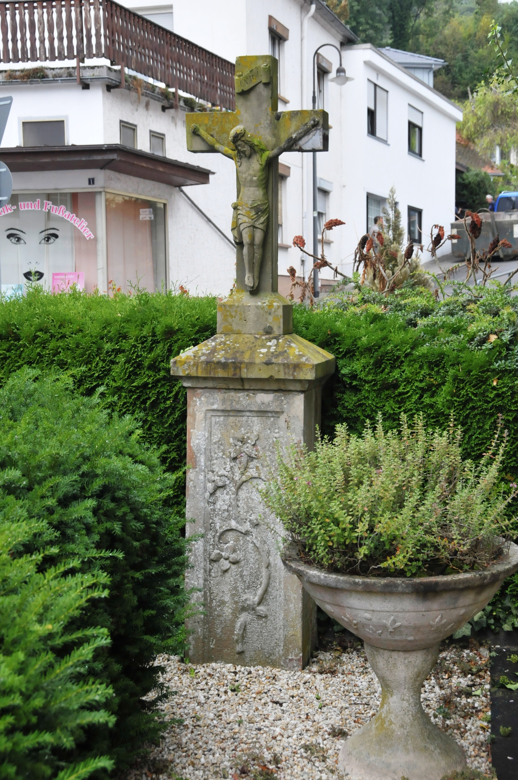 Echternacherbrück, Wegekreuz